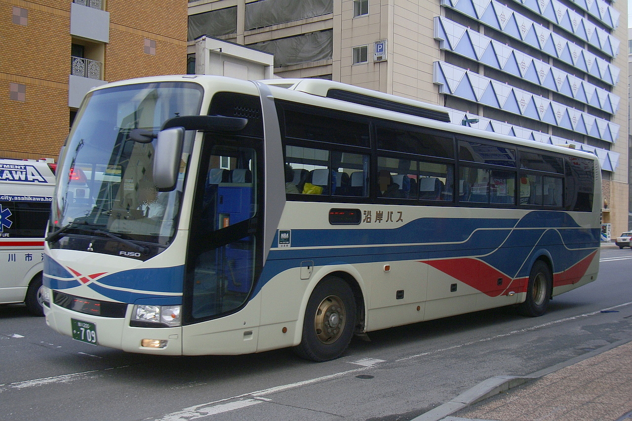 Asahikawa to Rumoi